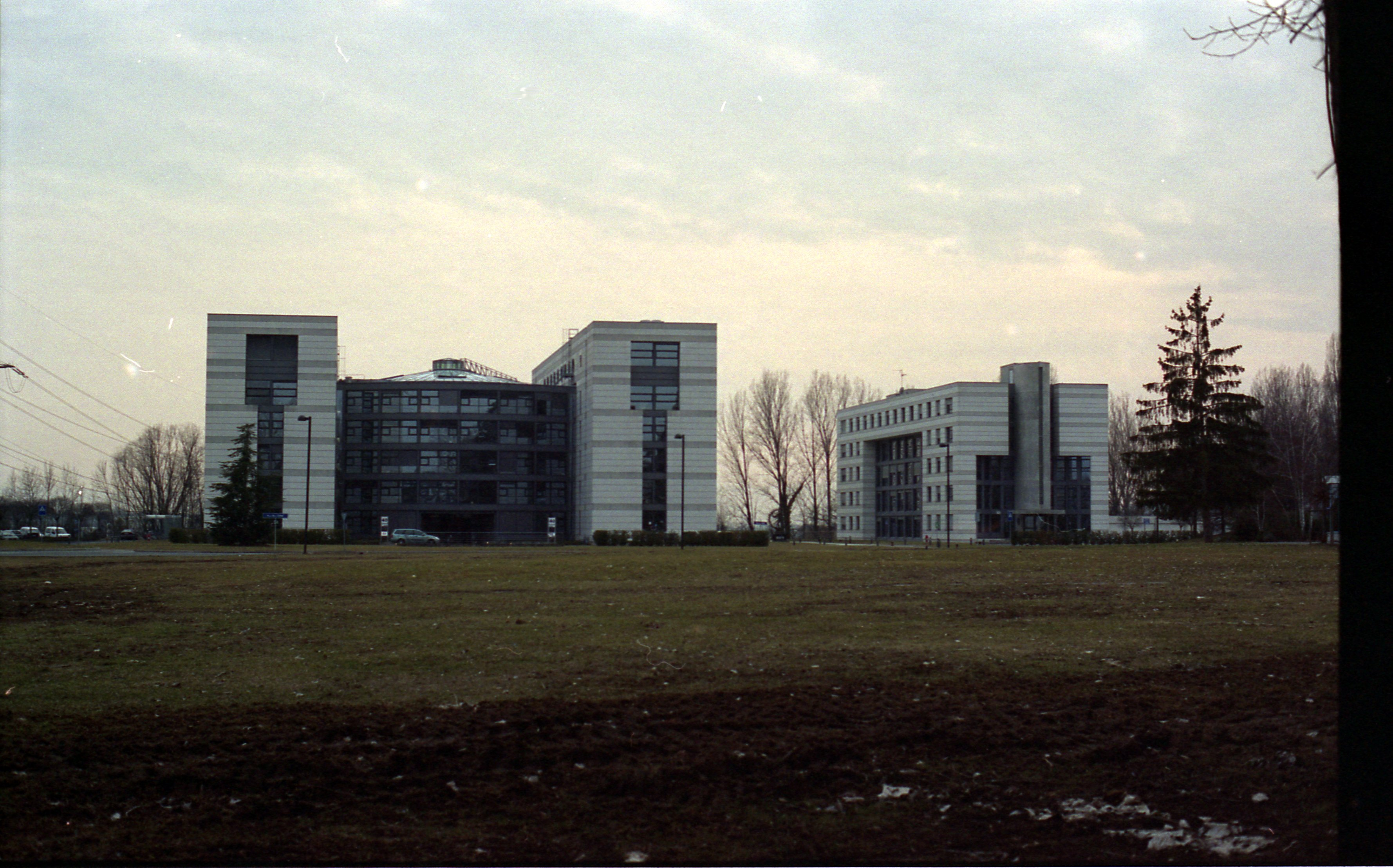 CERN: ATLAS et le Microcosme